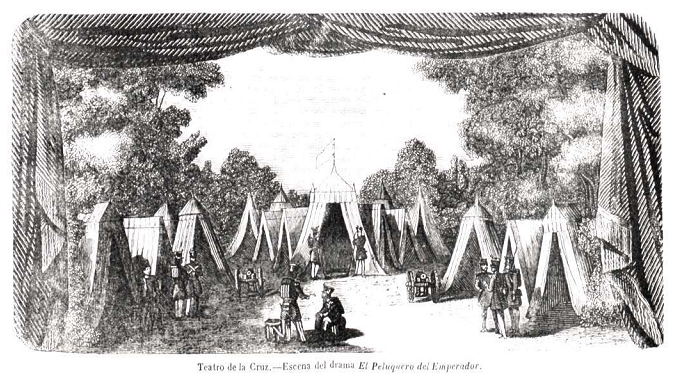 Teatro de la Cruz, escena del drama «El peluquero del emperador», en la revista española La Ilustración.